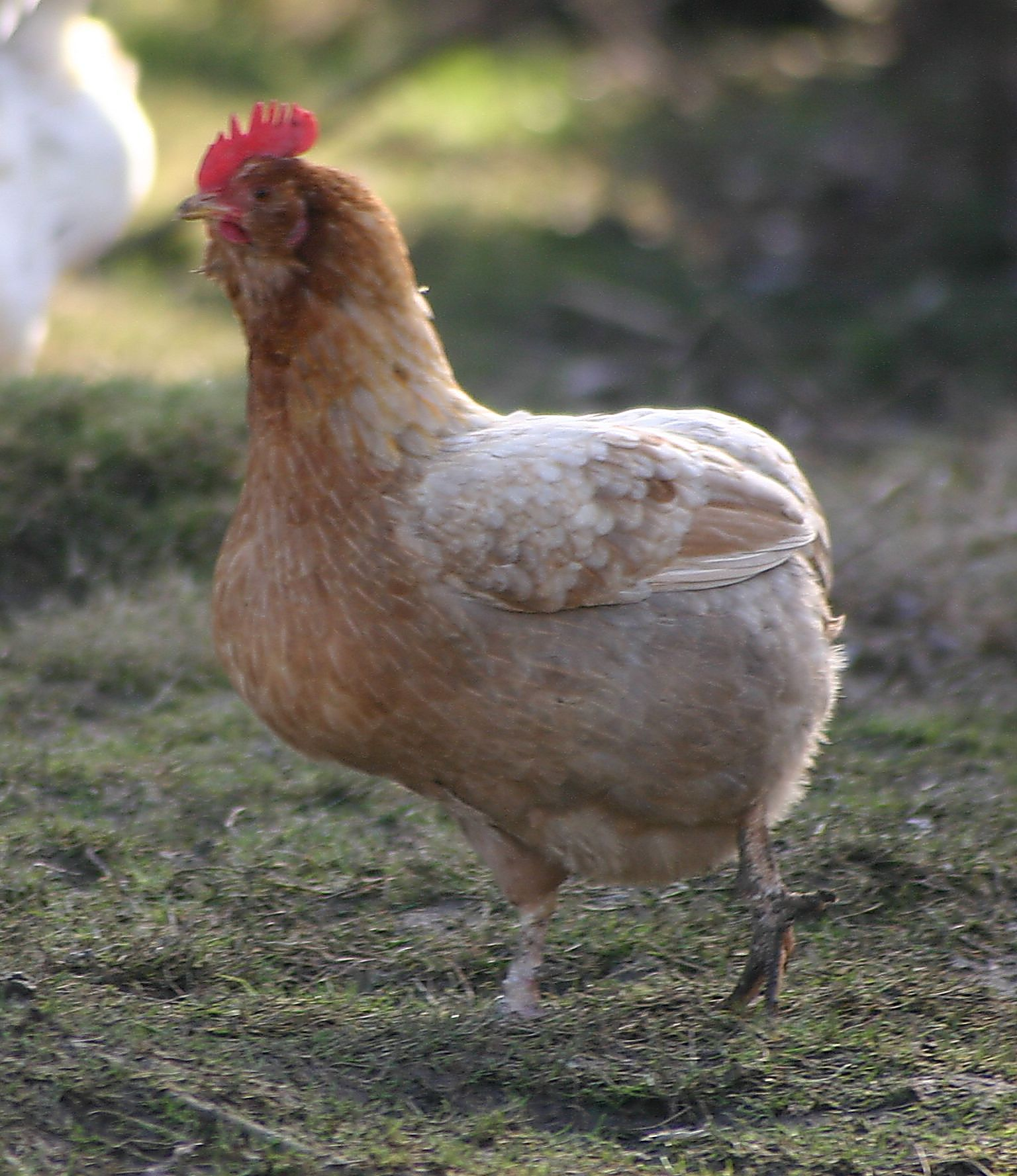 Kaulhuhnhenne